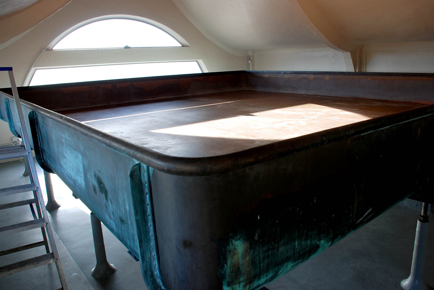 Brouwerij Bockor koelschip